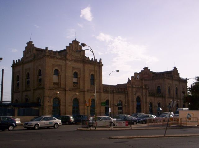 Estación de Tren en Huelva, España, de finales del XIX y estilo neomudejar.